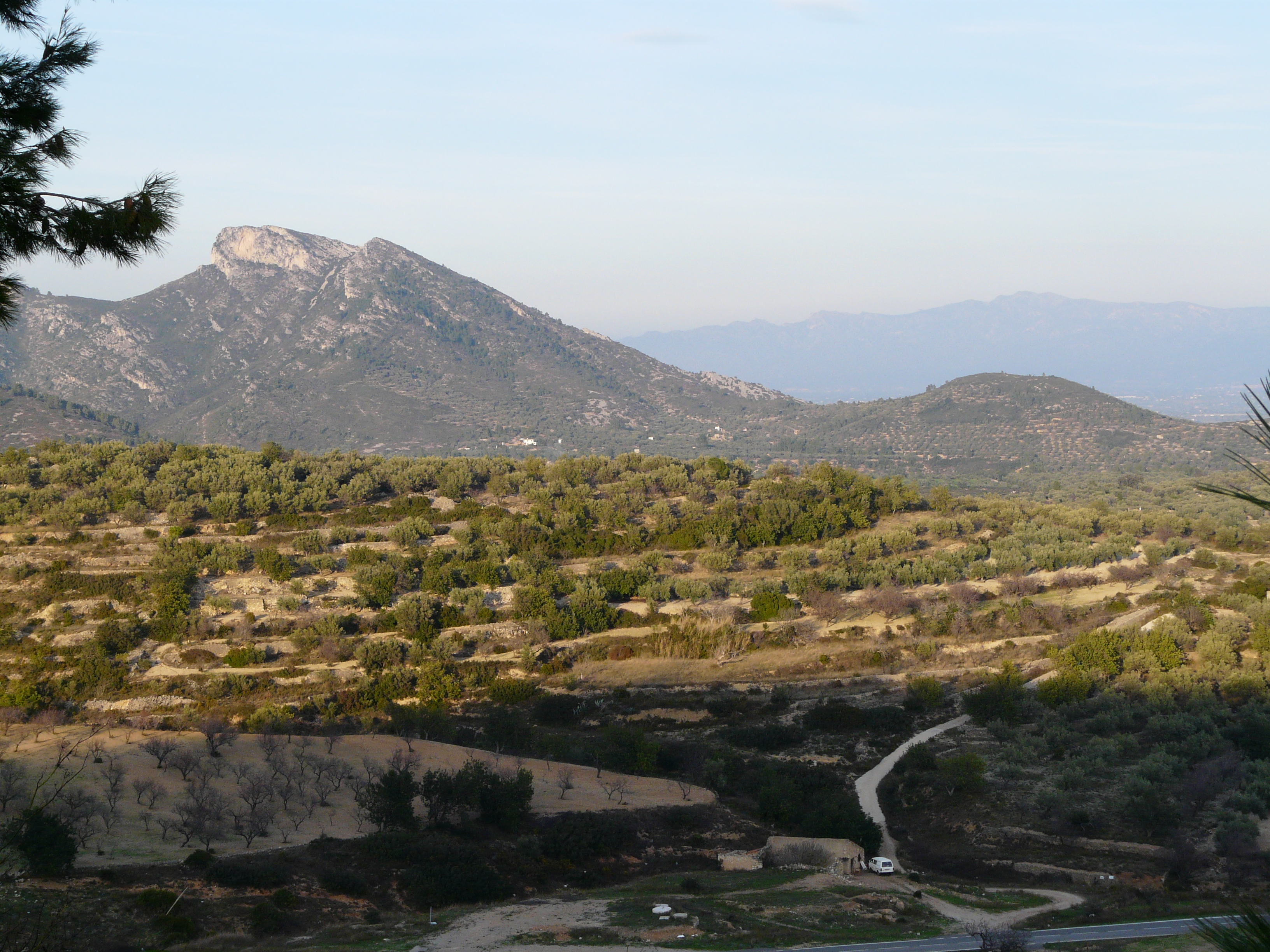 El Rastell vist des del Mas de Barberans. A l'esquerra s'hi veu el coll de la Bassota.